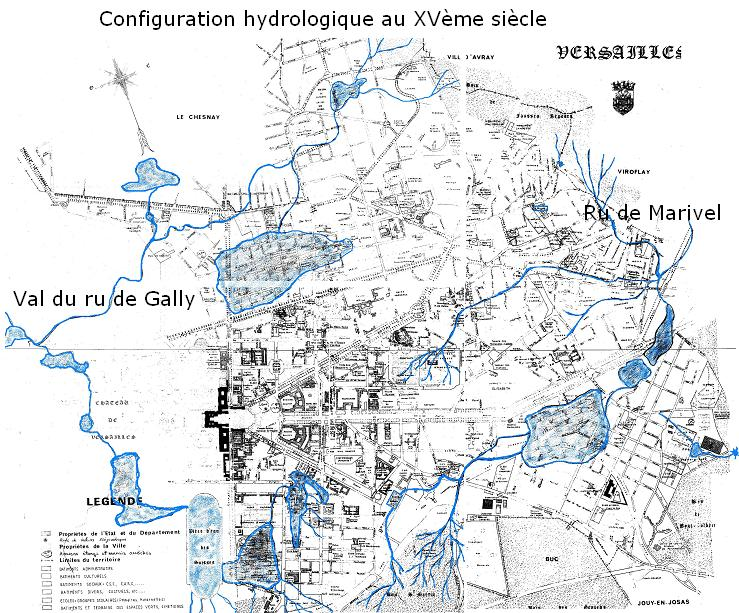 Configuration hydrologique de la plaine de Versailles au XVème siècle